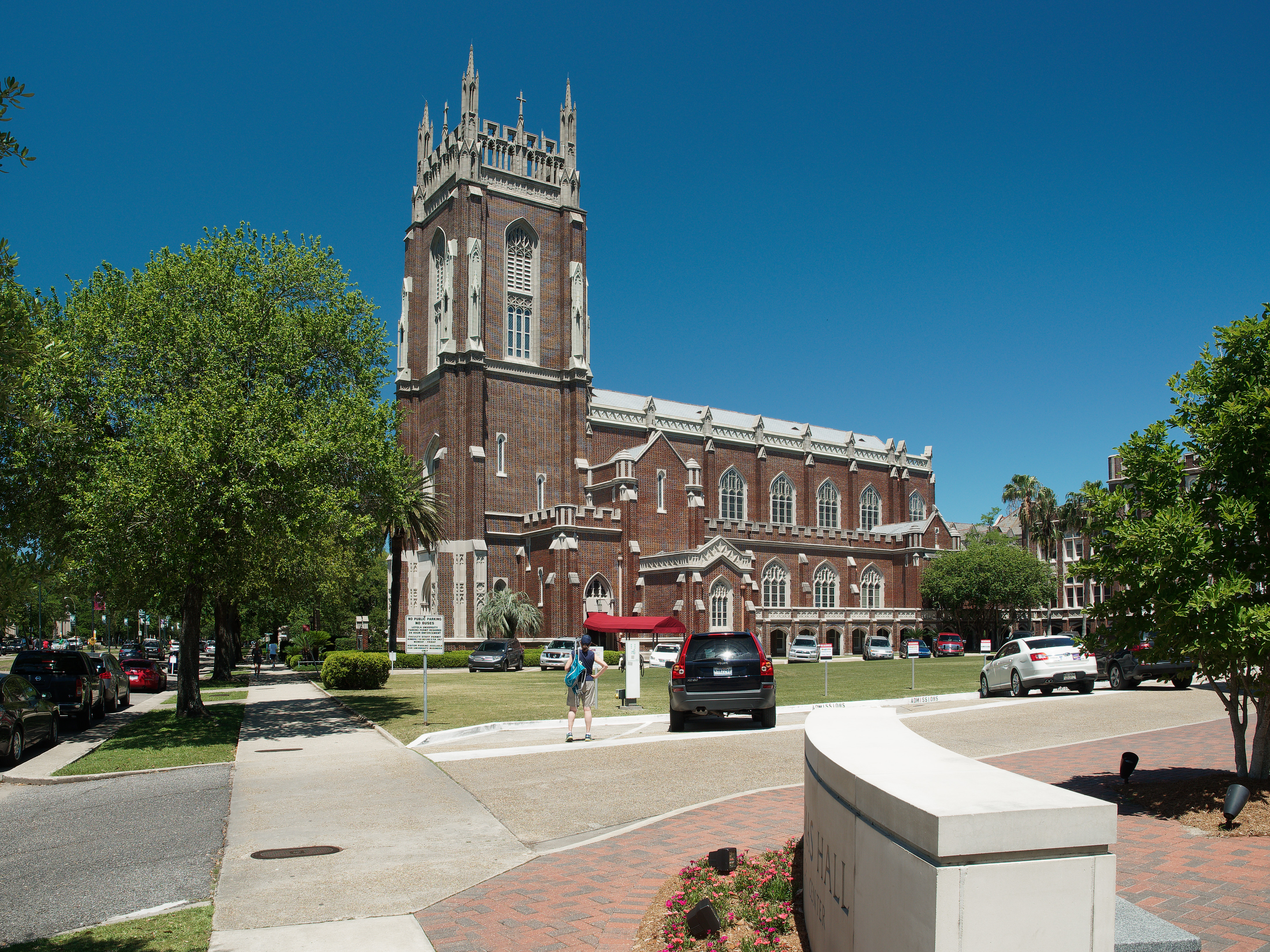 New Orleans (La, USA) Loyola Universität, Holy Name of Jesus Church (New Orleans)